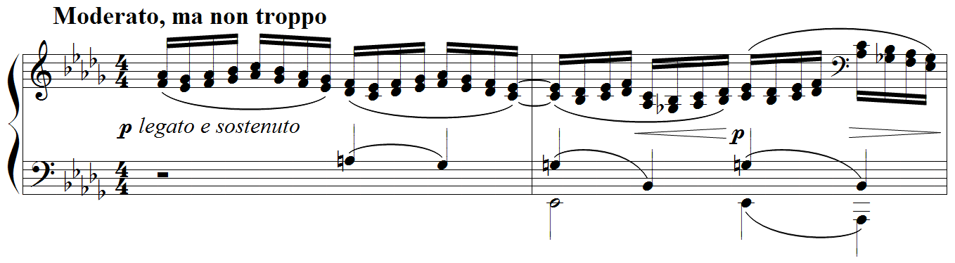 Claude Debussy - Etude "pour les tierces", mes 1-2